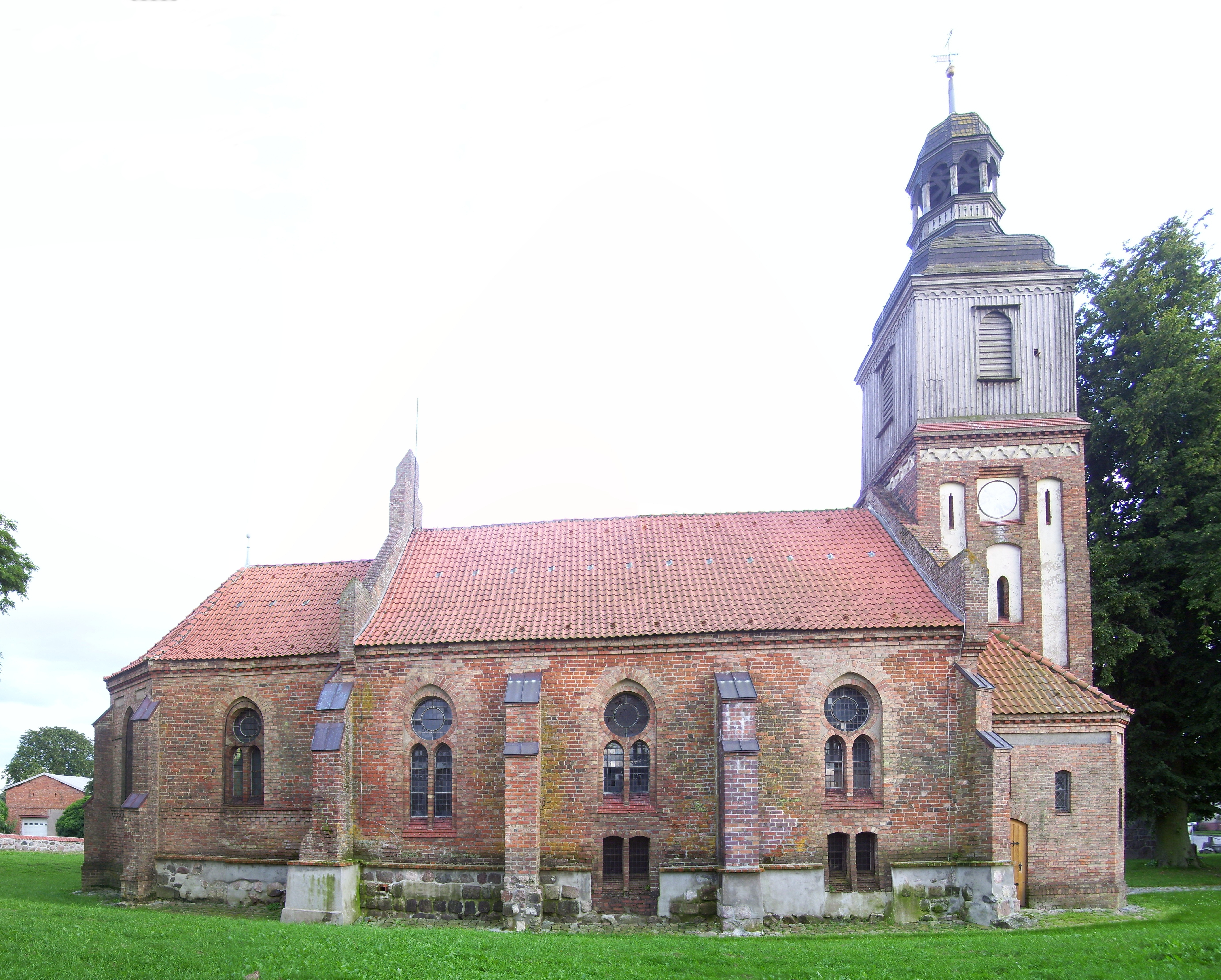 Kirche in Golchen, Landkreis Demmin, Nordseite